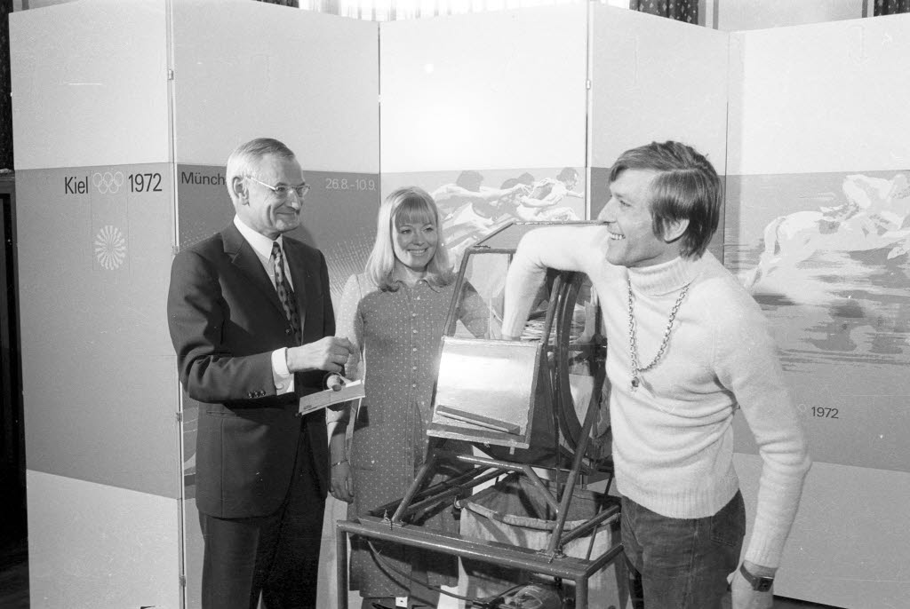 Unter Aufsicht von Bürgermeister Hans-Joachim Barow und Stadtinspektorin Melitta Rosenkranz zieht Hill die ersten Namen für den Gewinn von Eintrittskarten für die Olympischen Spiele in München. Insgesamt 500 Karten sind in der Lotterie zu gewinnen.